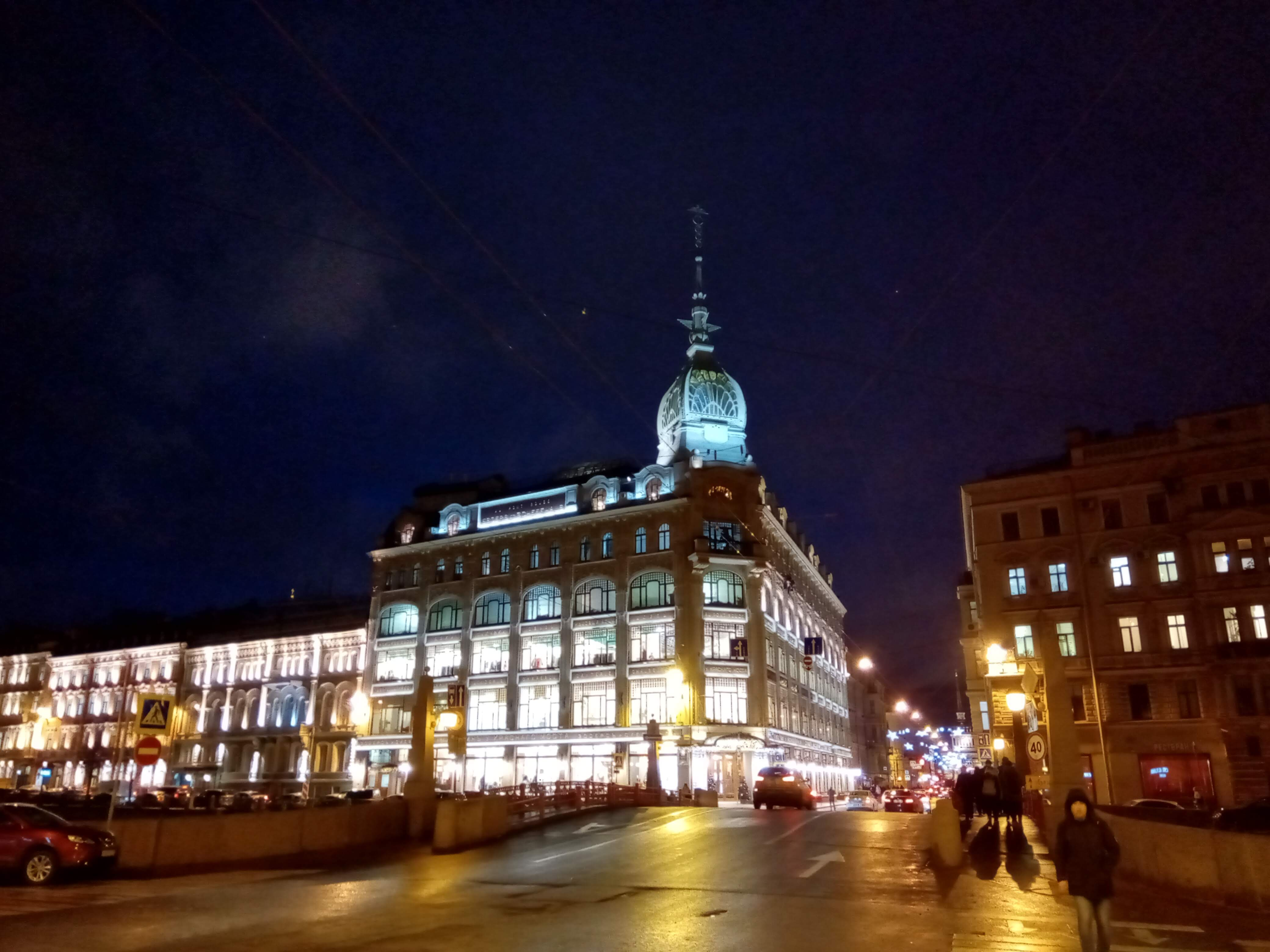 Красный мост вечером